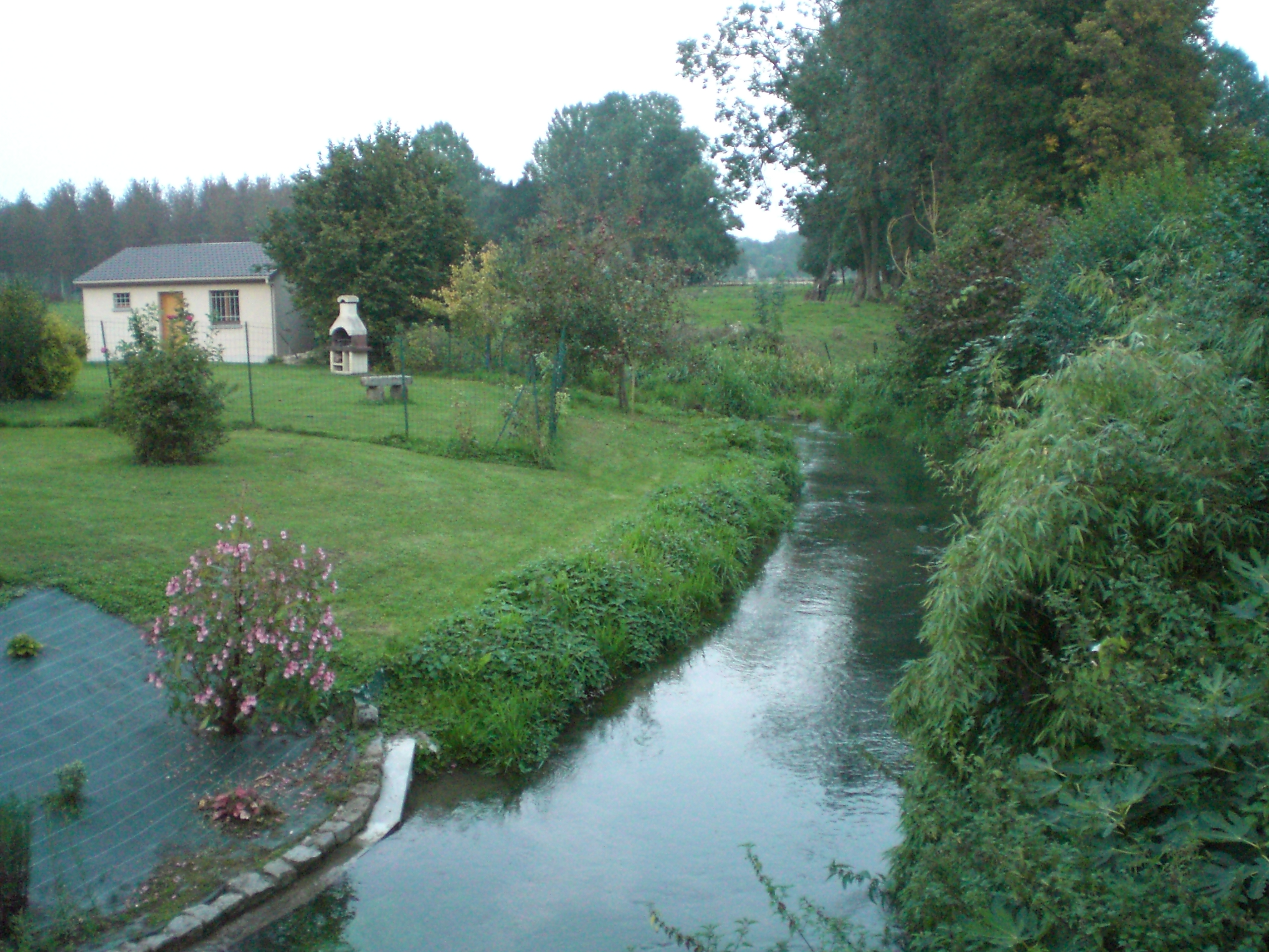 La Luce à Démuin en septembre 2014